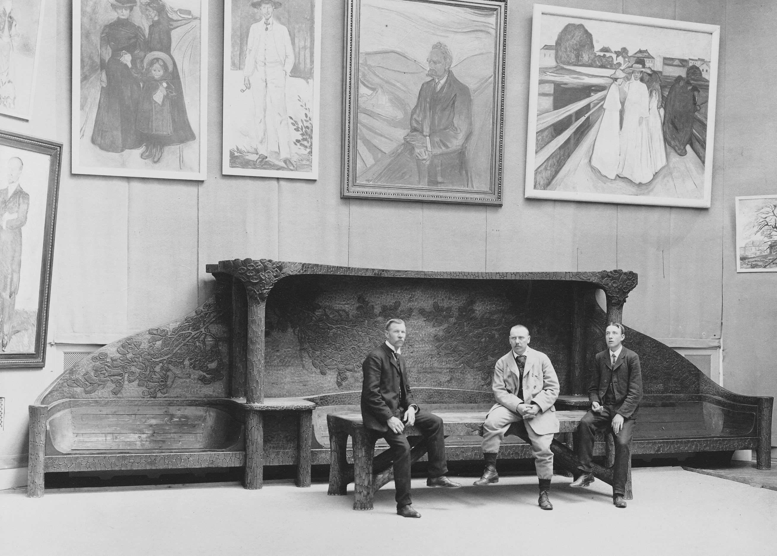 Villa Eolskulle (Thielska galleriet), "Thiels soffa" med skaparen Gustaf Fjæstad i mitten, träsnidaren Ola Erikson till höger och snickaren Adolf Svenson till vänster